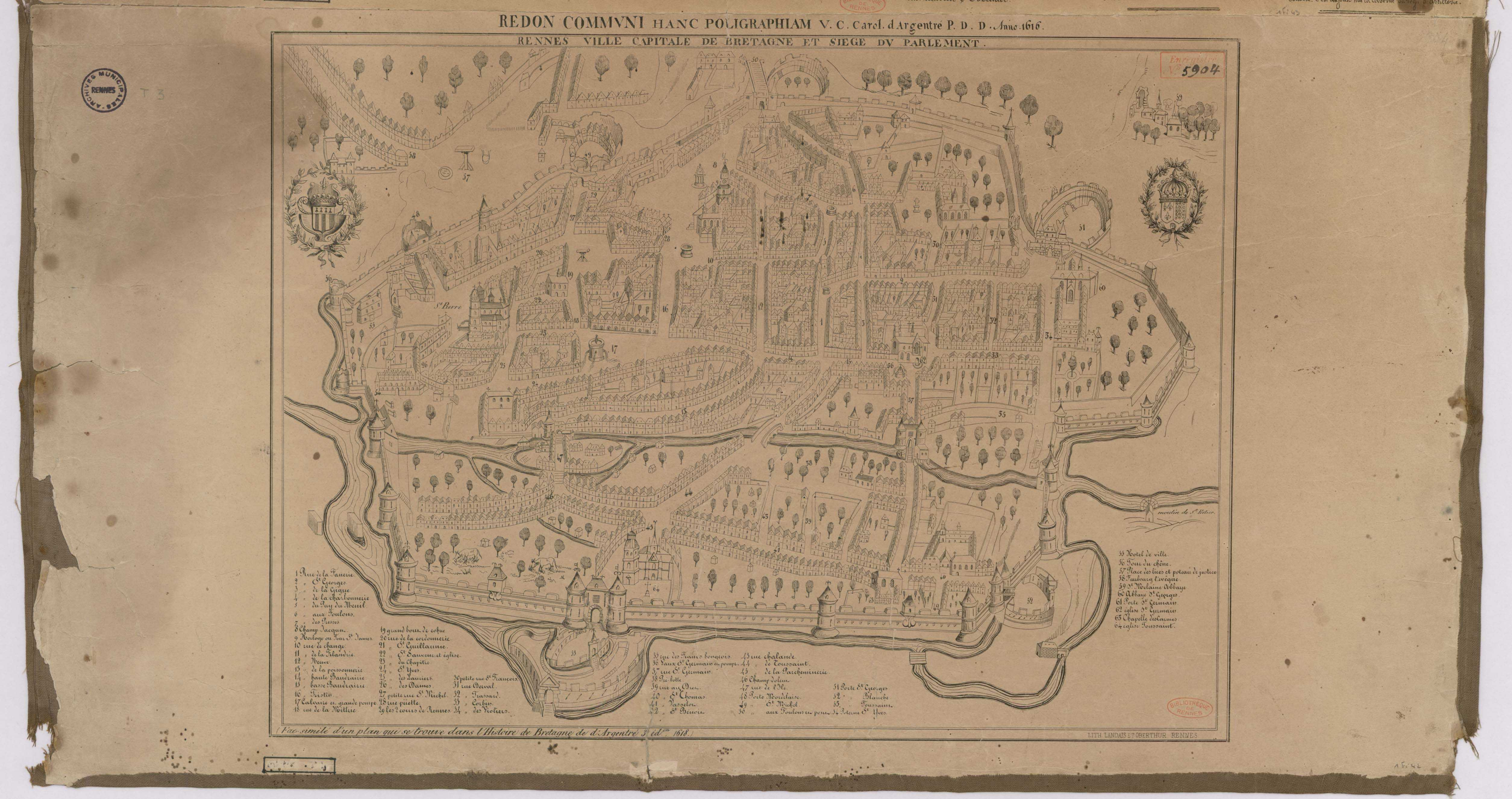 Plan de « Rennes, ville capitale de Bretagne et siège du Parlement 1616 » Fac similé d'un plan qui se trouve dans l'histoire de Bretagne de D'Argentré, 3ème édition de 1618.